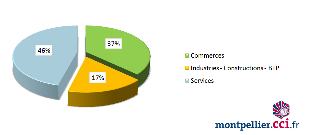 Répartition par activités sur la CCI de Montpellier